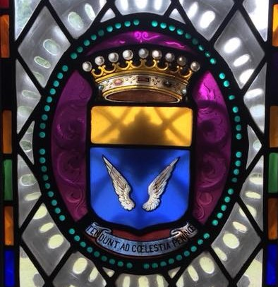 Armoiries Penet de Monterno sur vitrail (Chateau de Bel Air)